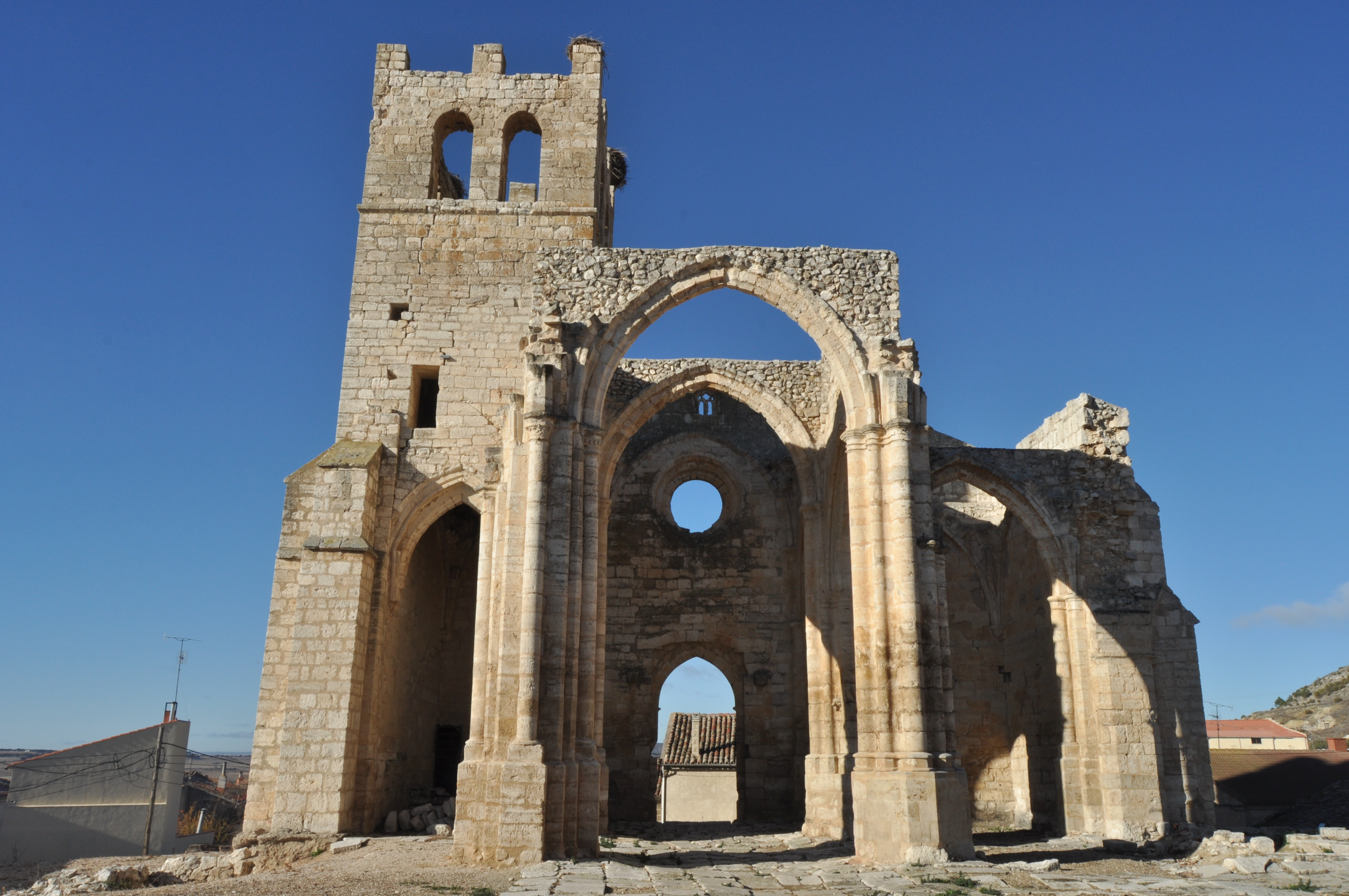 Palenzuela - 017